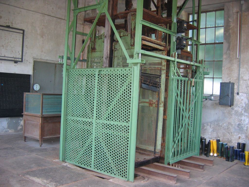 Förderkorb aus dem Harzbergbau eigenes foto 2005